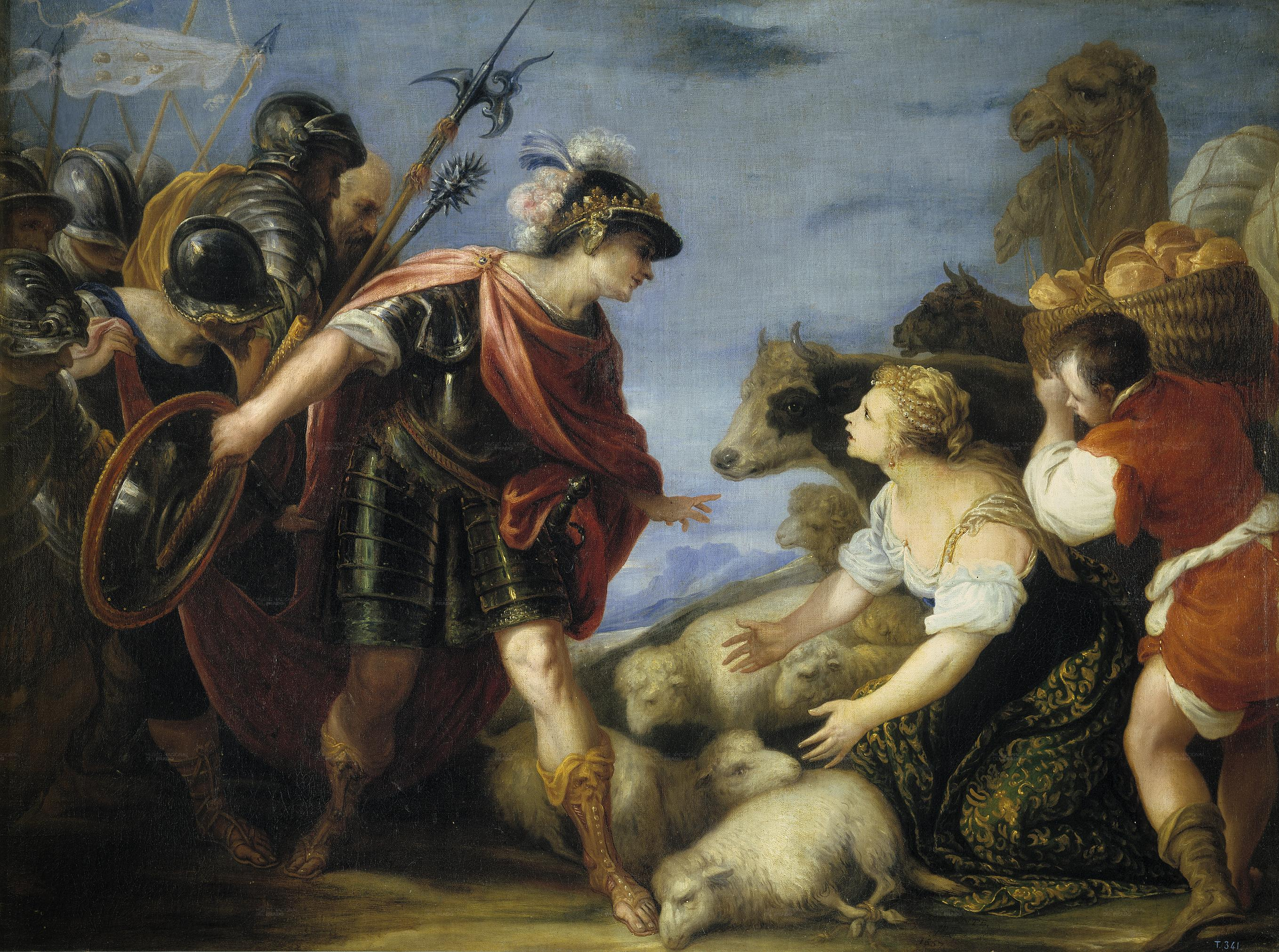 La obra representa a la prudente Abigaíl junto a David, el futuro rey de Israel.